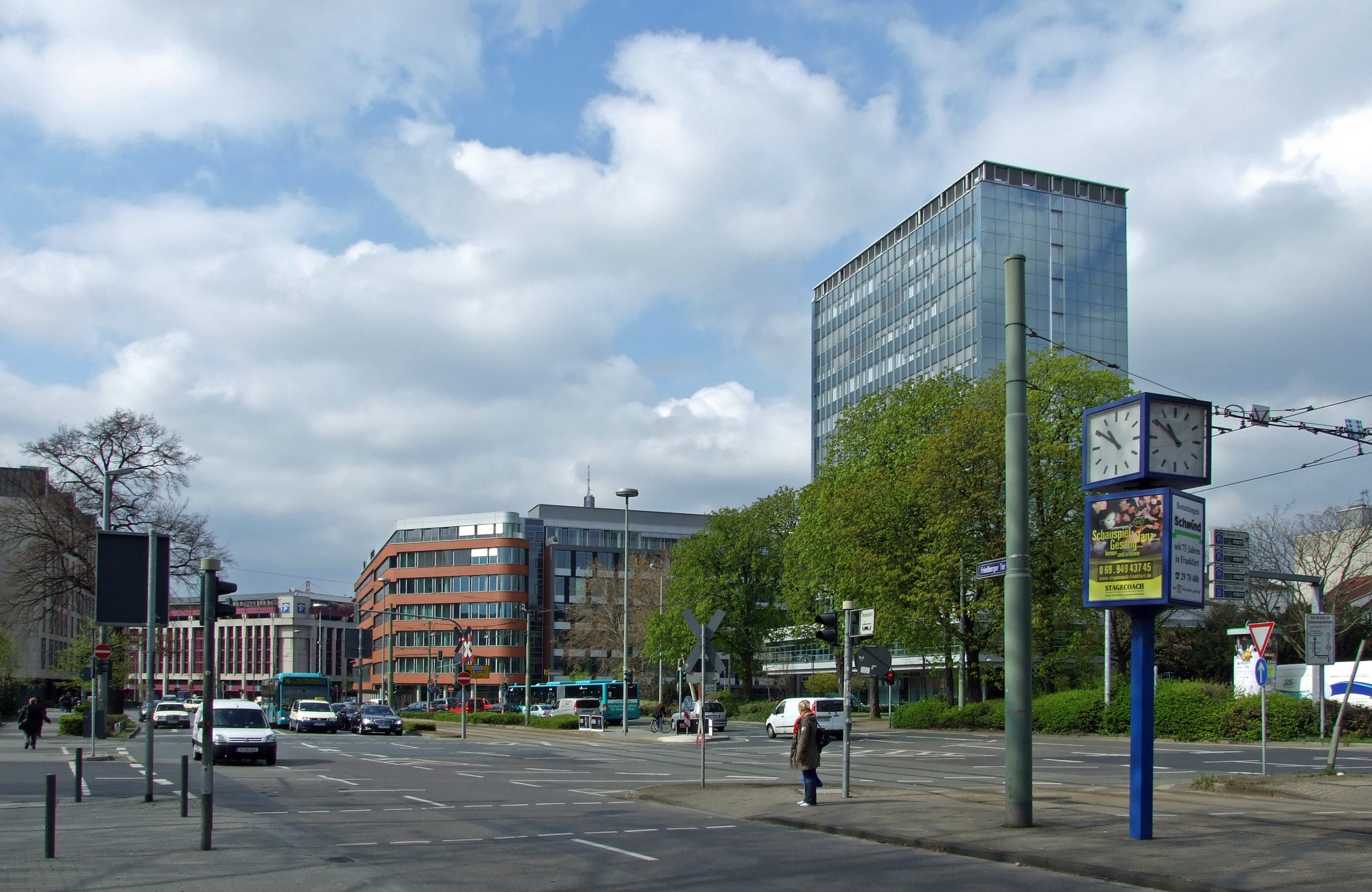 Das „Friedberger Tor“, zwischen Konrad-Adenauer-Strasse und der Kreuzung Anlagenring/Friedberger Landstrasse in Ffm